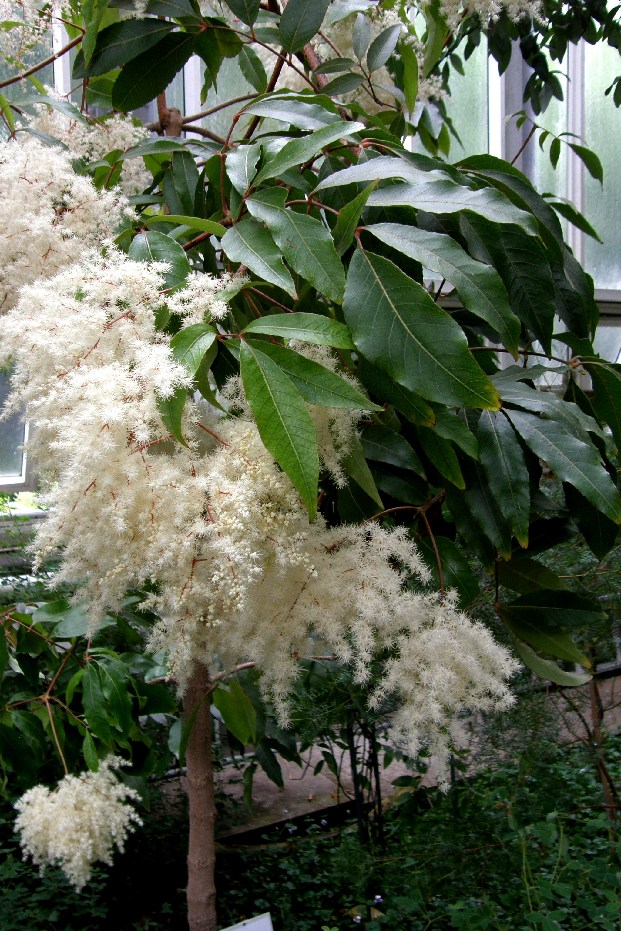 Caldcluvia paniculata D.Don en fleur dans la serre du Botanischer Garten de Berlin-Dahlem